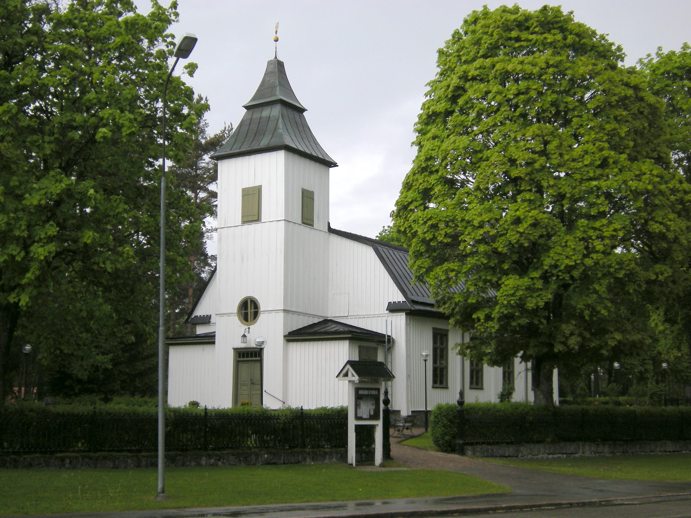 Högbo kyrka i Gästrikland